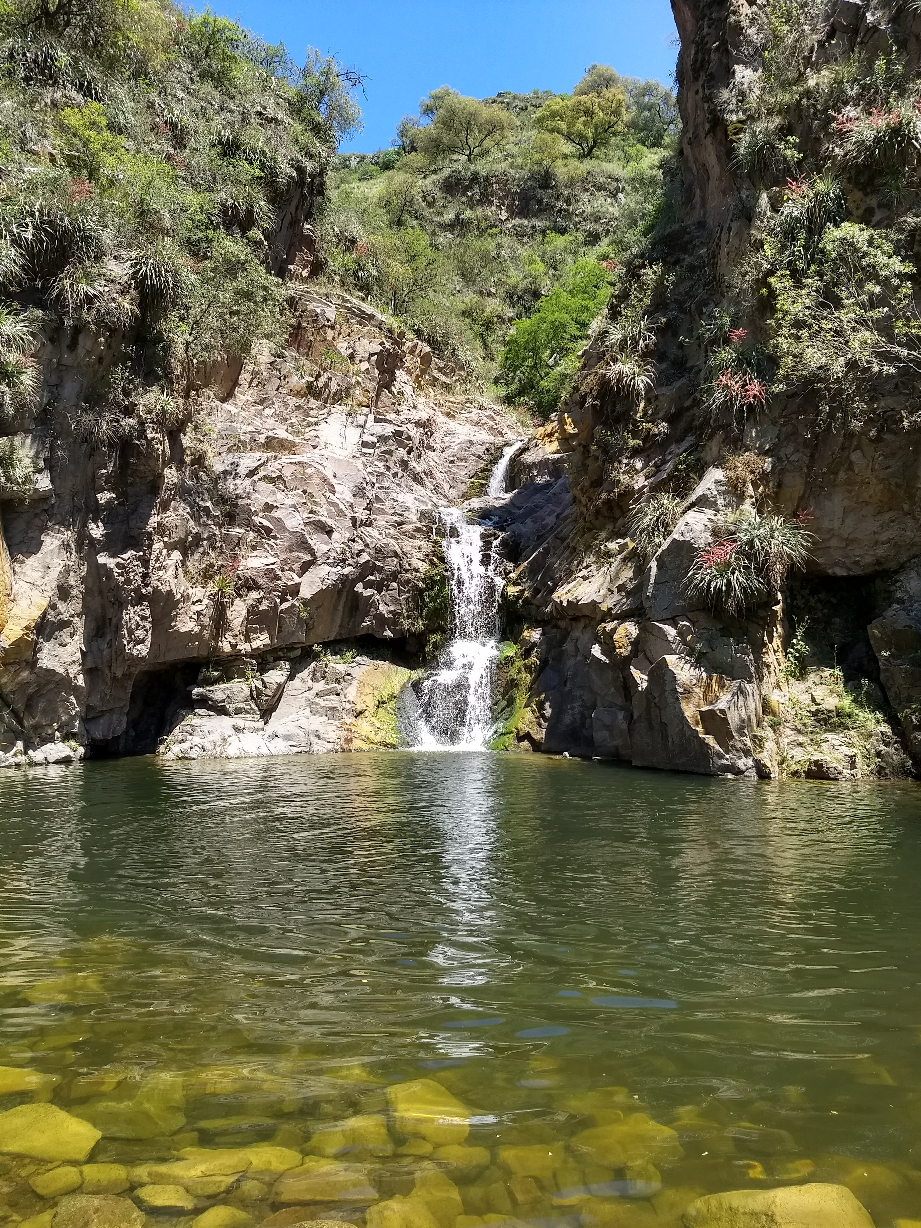 Cascada Los Hornillos